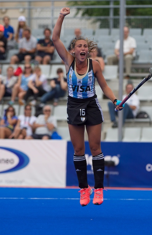 Gol de flor contra china en semi final world league 2015